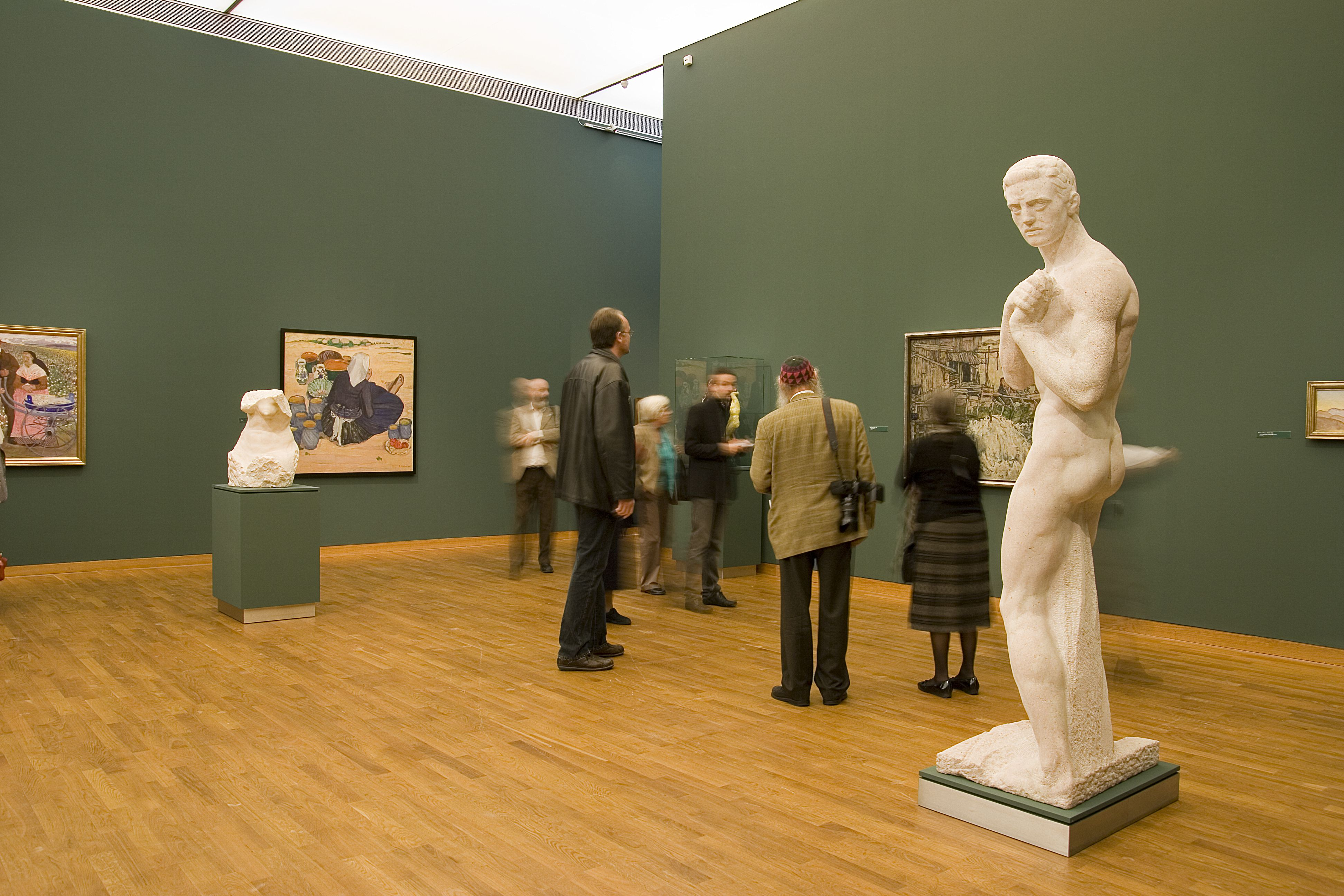 Landesmuseum Niederösterreich, Kunstbereich